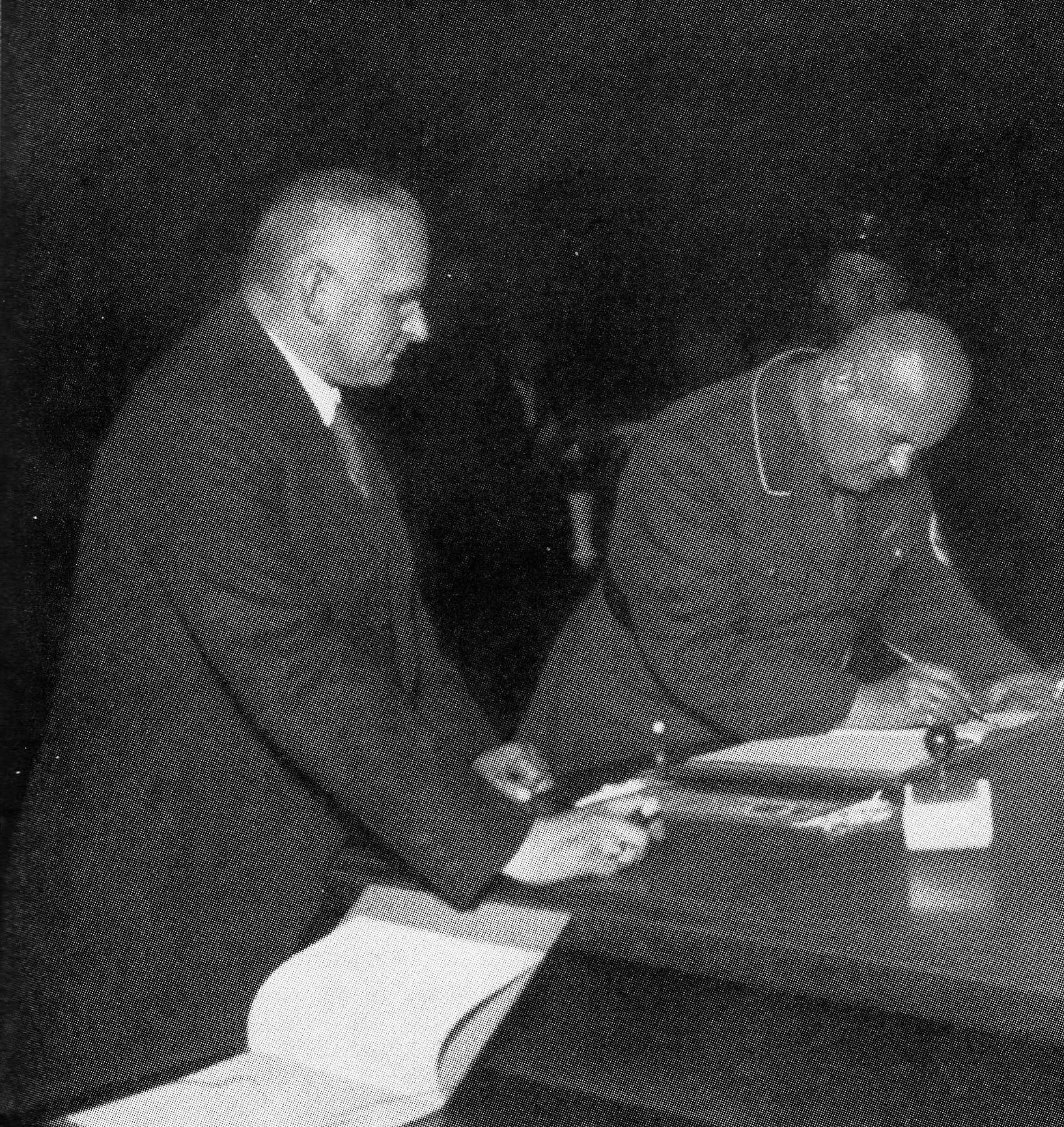 Carl Friedrich Goerdeler bei einer Amtshandlung als Oberbürgermeiter von Leipzig: Otto Georg Thierack, später nationalsozialistischer Justizminister, trug sich ins Goldene Buch der Stadt ein. Thierack war später für Goerdelrs Hinrichtung mitverantwortlich.